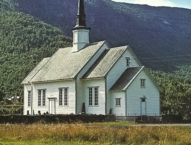 Hornindal kirke